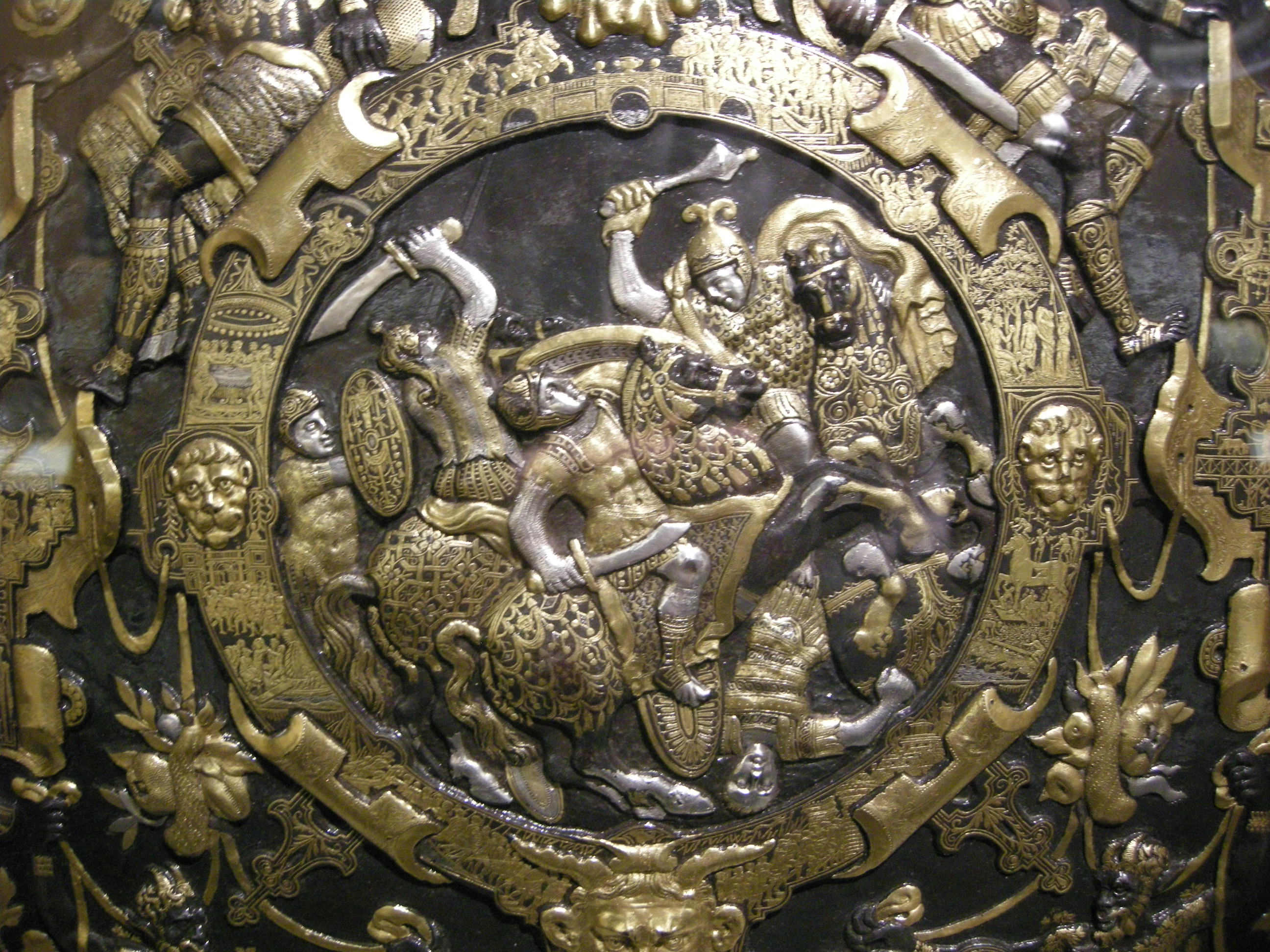 Giorgio ghisi, mantova, scudo da parata, 1554